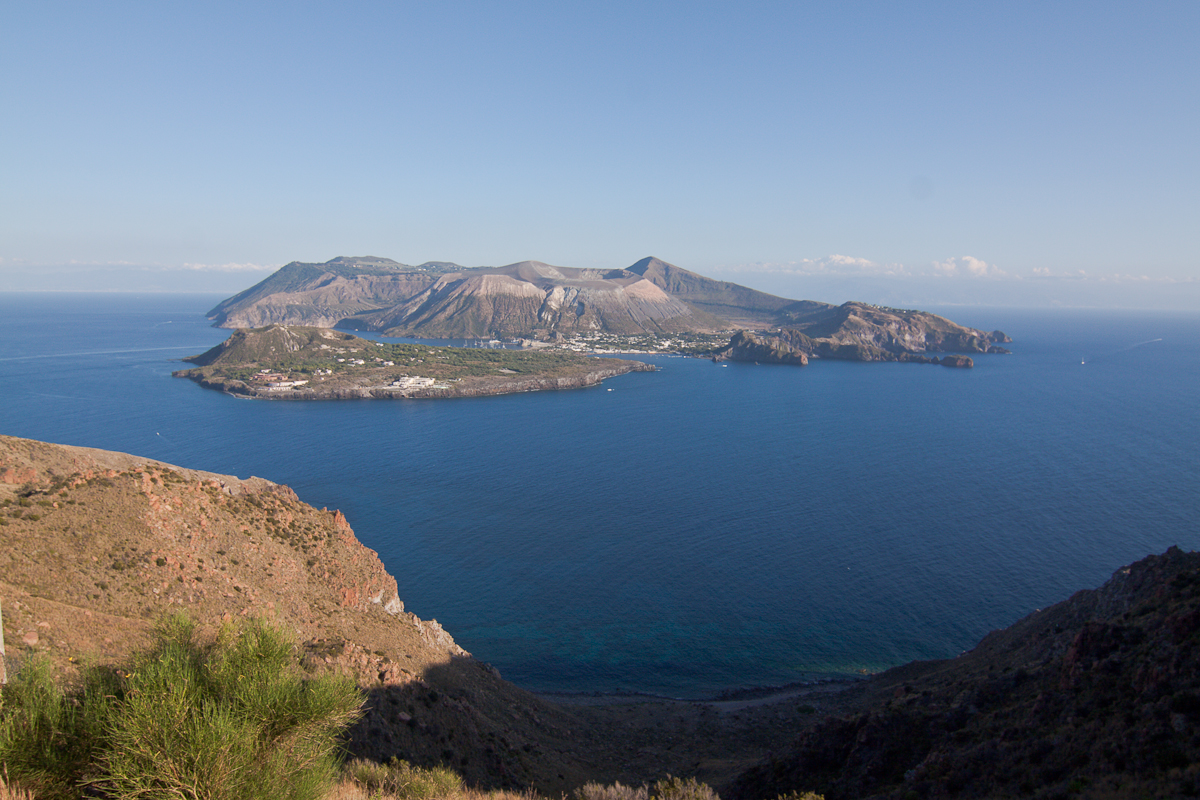 Vulcano visto da Quattrocchi (Lipari)